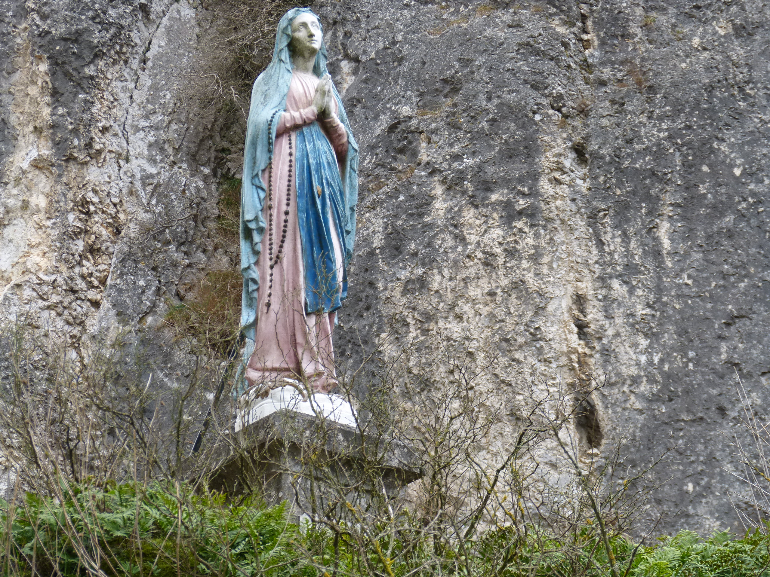 L'origine de la statuaire des Vierges du voeu, visible dans plusieurs communes de la Drôme, est double. Le 9 juillet 1944, à Die, l'abbé Jean Bossan pousse ses paroissiens à implorer la protection de la Vierge et à faire le vœu d'ériger une statue en son honneur si la ville est protégée. L'évêque de Valence-sur-Rhône, Monseigneur Camille Pic, lance ensuite le mouvement départemental par le biais de la Semaine religieuse du diocèse de Valence-sur-Rhône, Die et Saint-Paul-Trois-Châteaux du 26 juillet 1944.